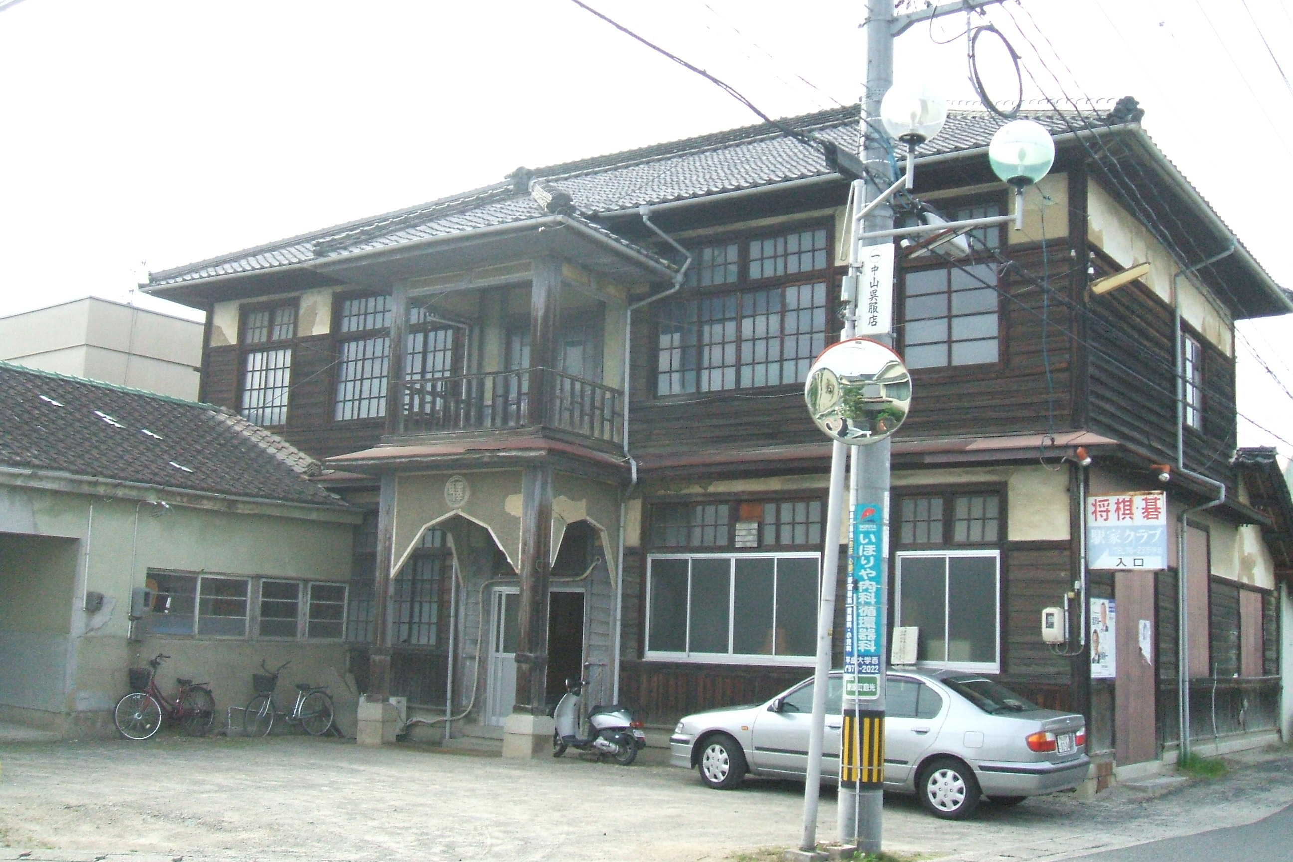 かつて駅家町役場として使われていた建物